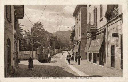 Cernobbio, tram